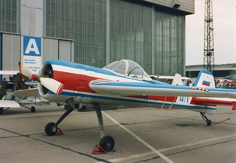 Kunstflugzeug Jakowlew Jak-55